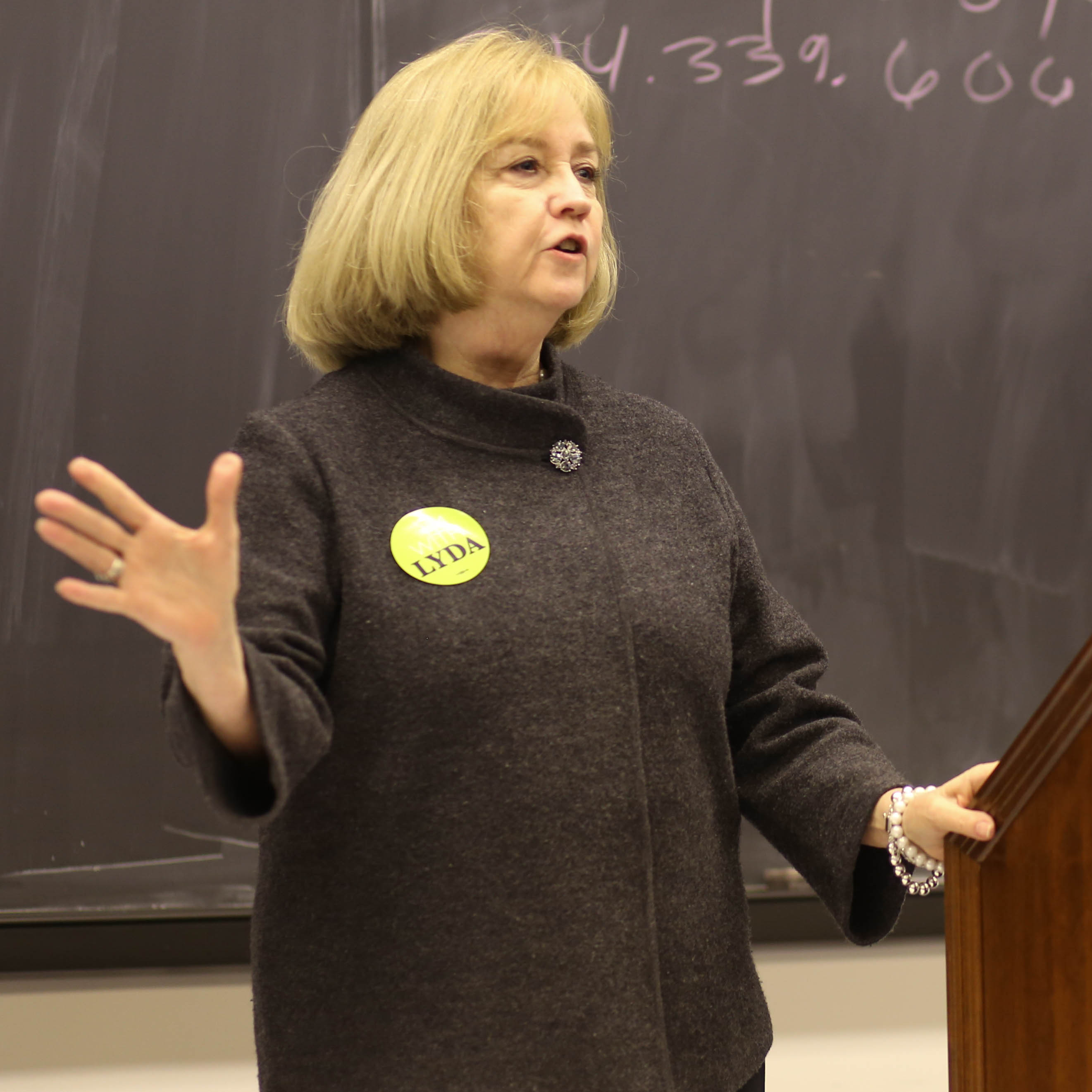 Lyda Krewson